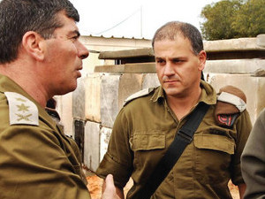 מפקד אוגדת עזה, תת-אלוף משה צ'יקו תמיר עם רב אלוף גבי אשכנזי.